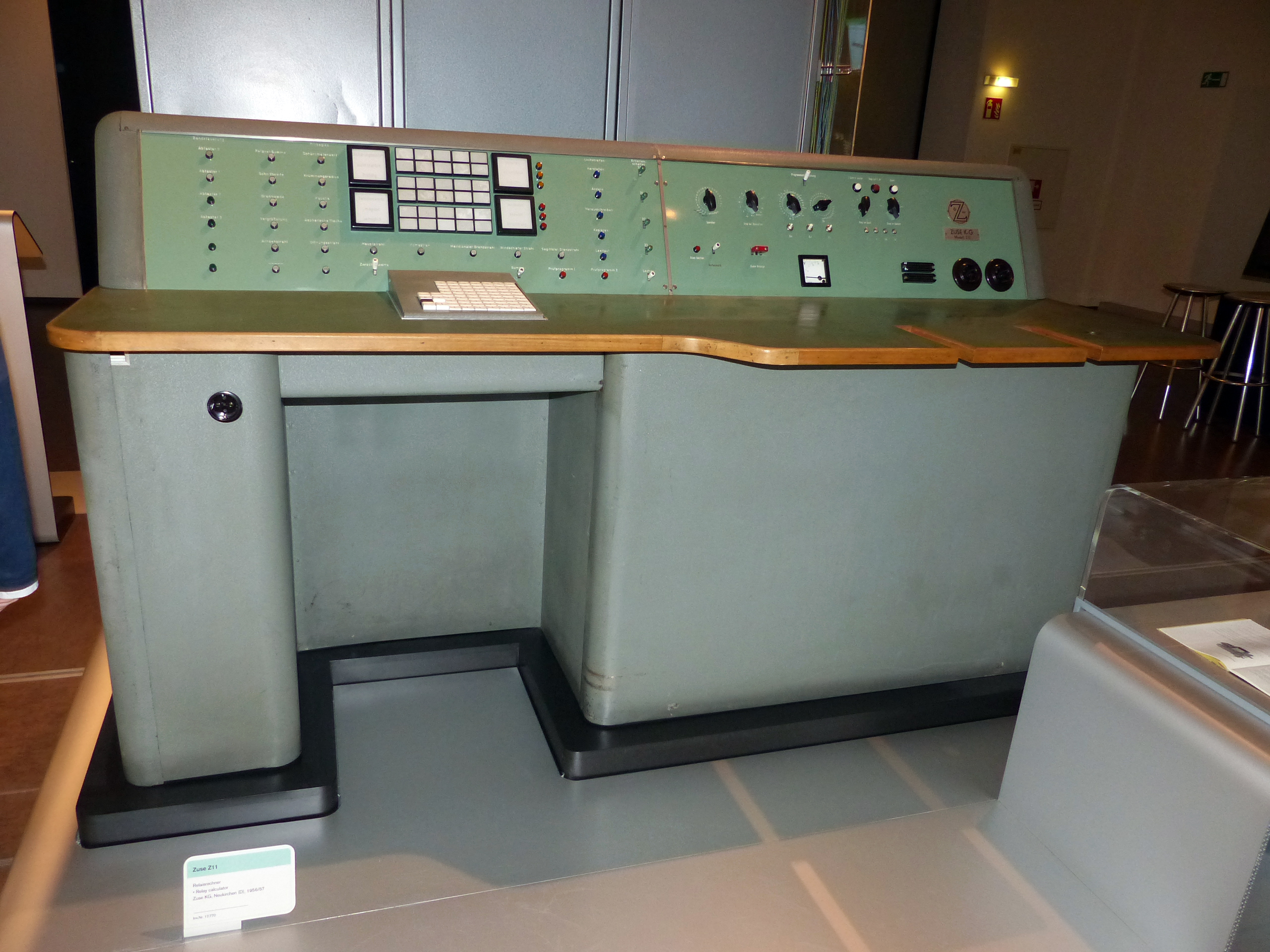 Computer Zuse Z11, 1956/57, Exponat im Technischen Museum Wien